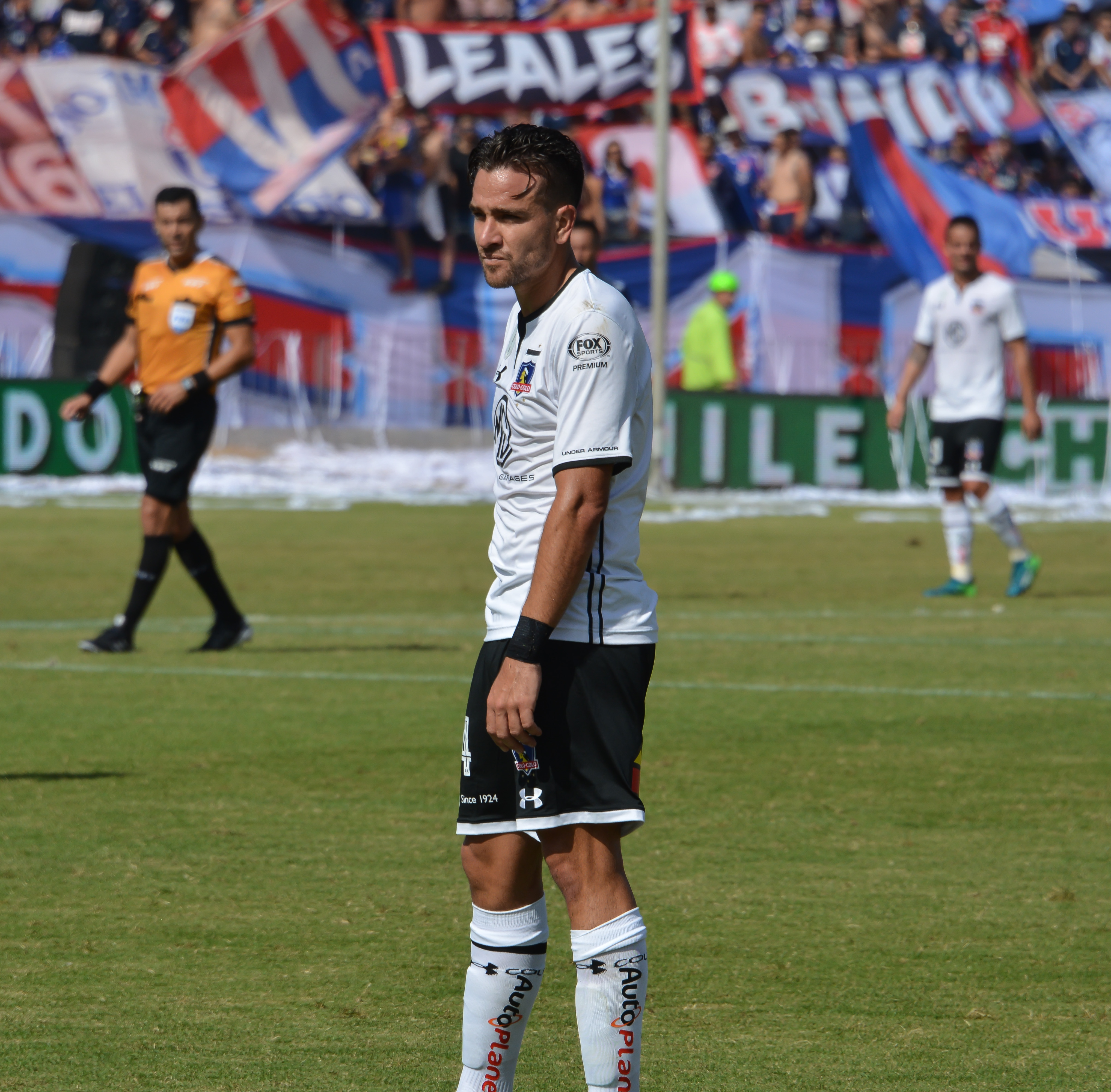 Universidad de Chile v Colo-Colo, Estadio Nacional, Santiago, Chile.